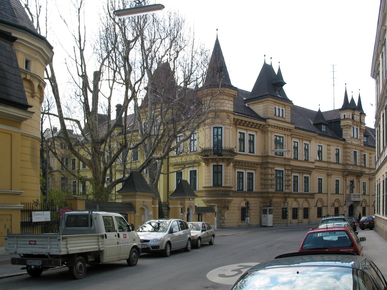 Palais Cumberland, Penzinger Straße